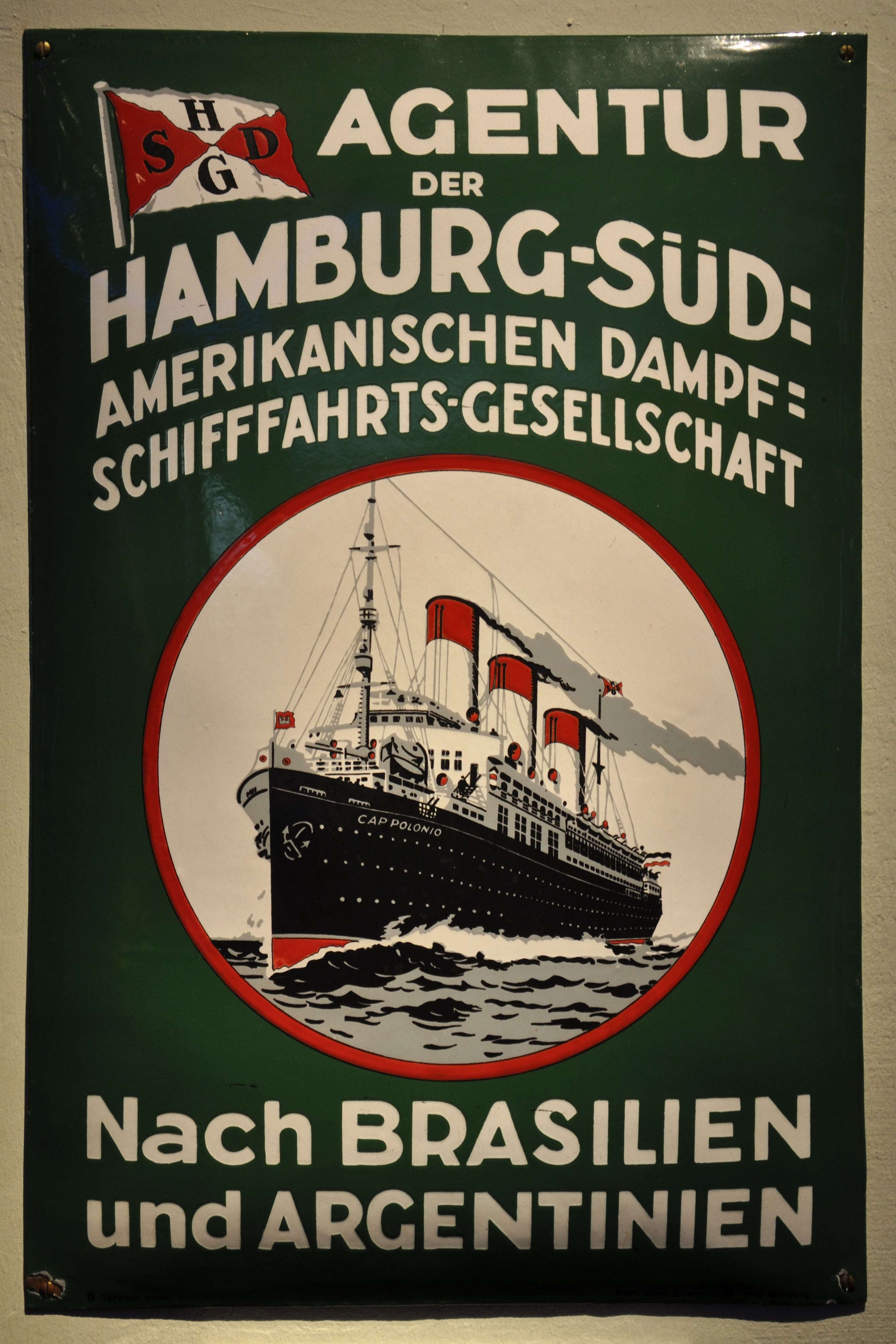 Schild aus der Ausstellung des Museums für Hamburgische Geschichte.